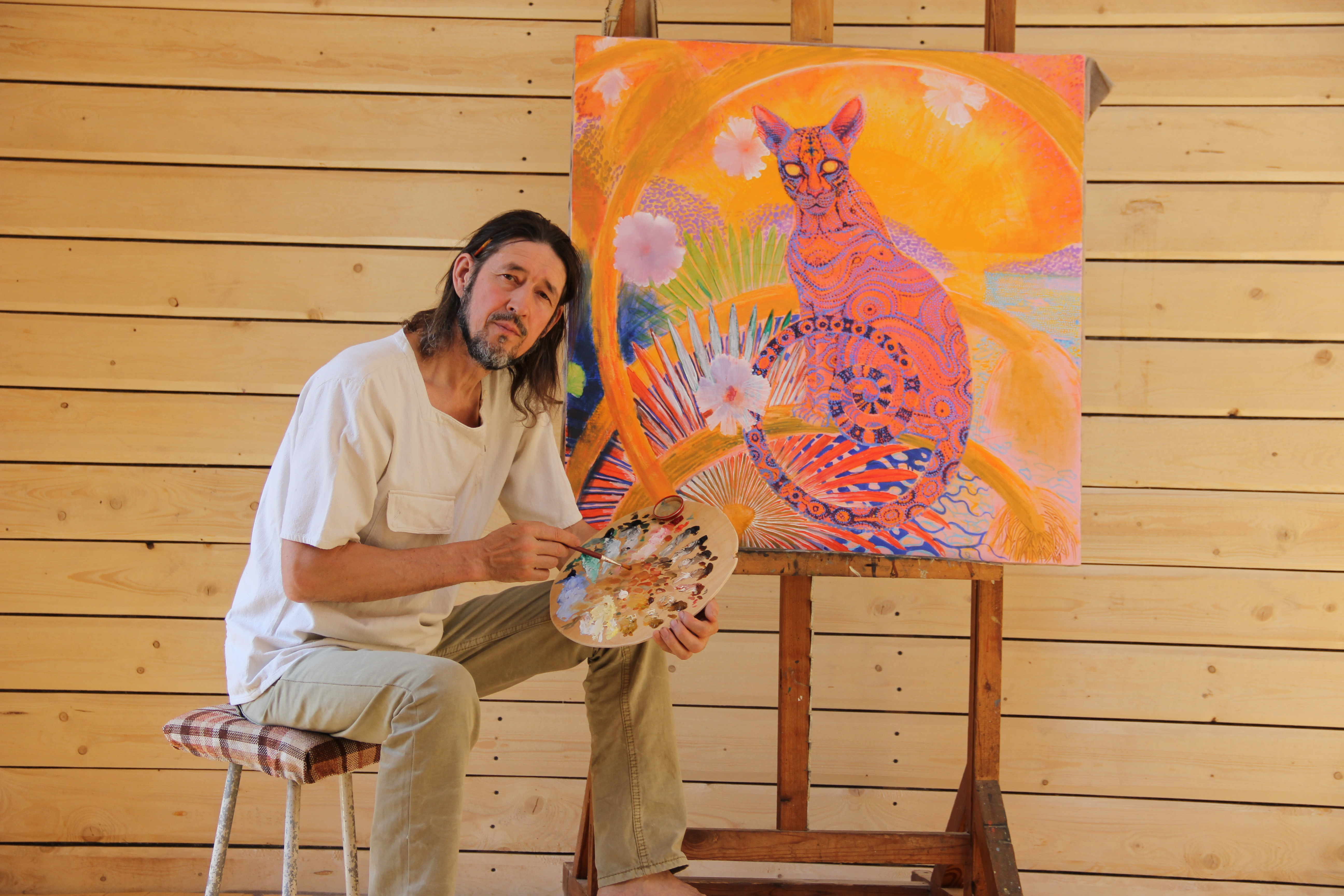 Портрет Г.Г. Фомирякова в процессе работы над картиной. Чиганары.